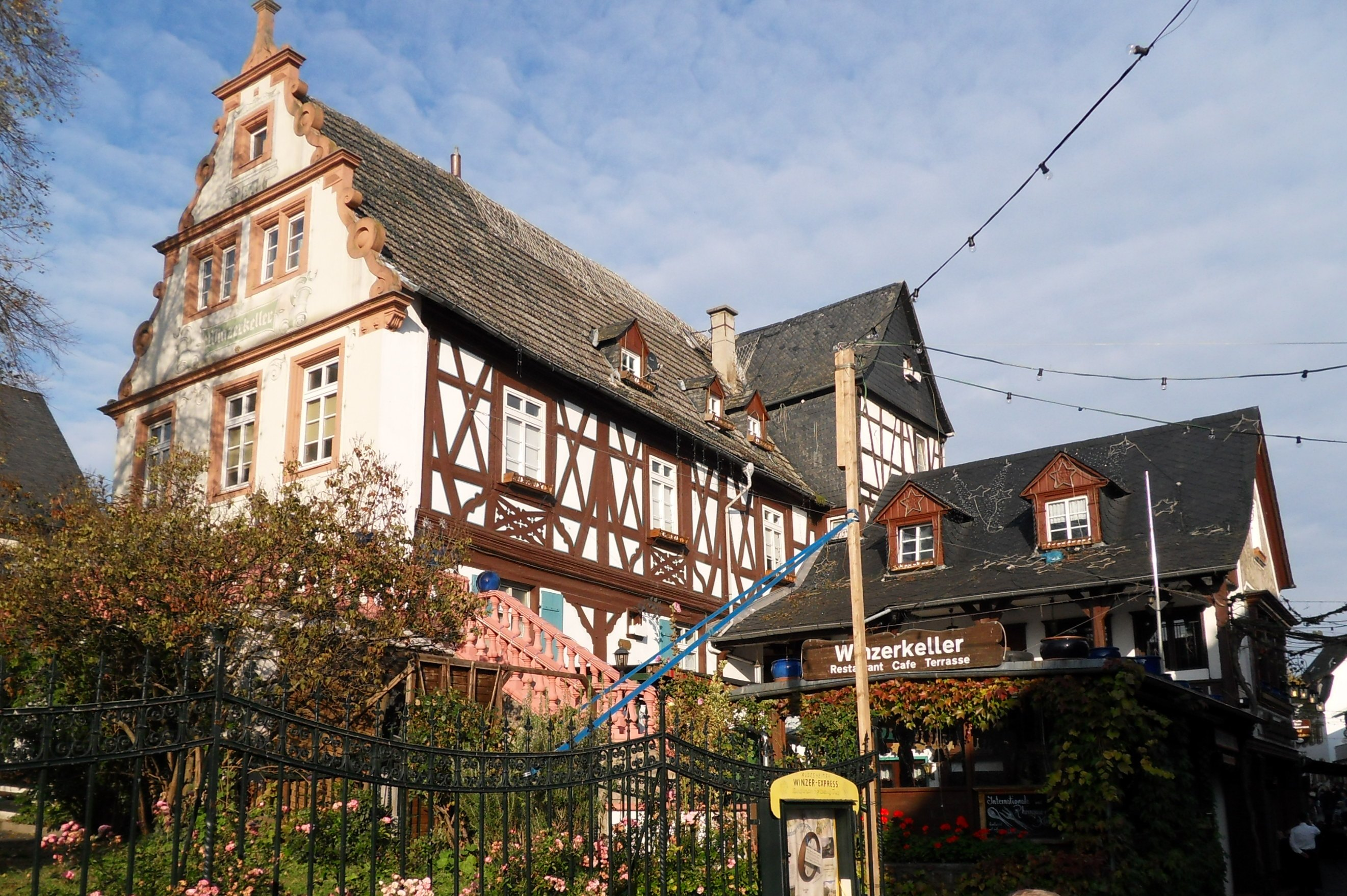 Historisches Gasthaus Winzerkeller in der Obergasse 33 in Rüdesheim am Rhein